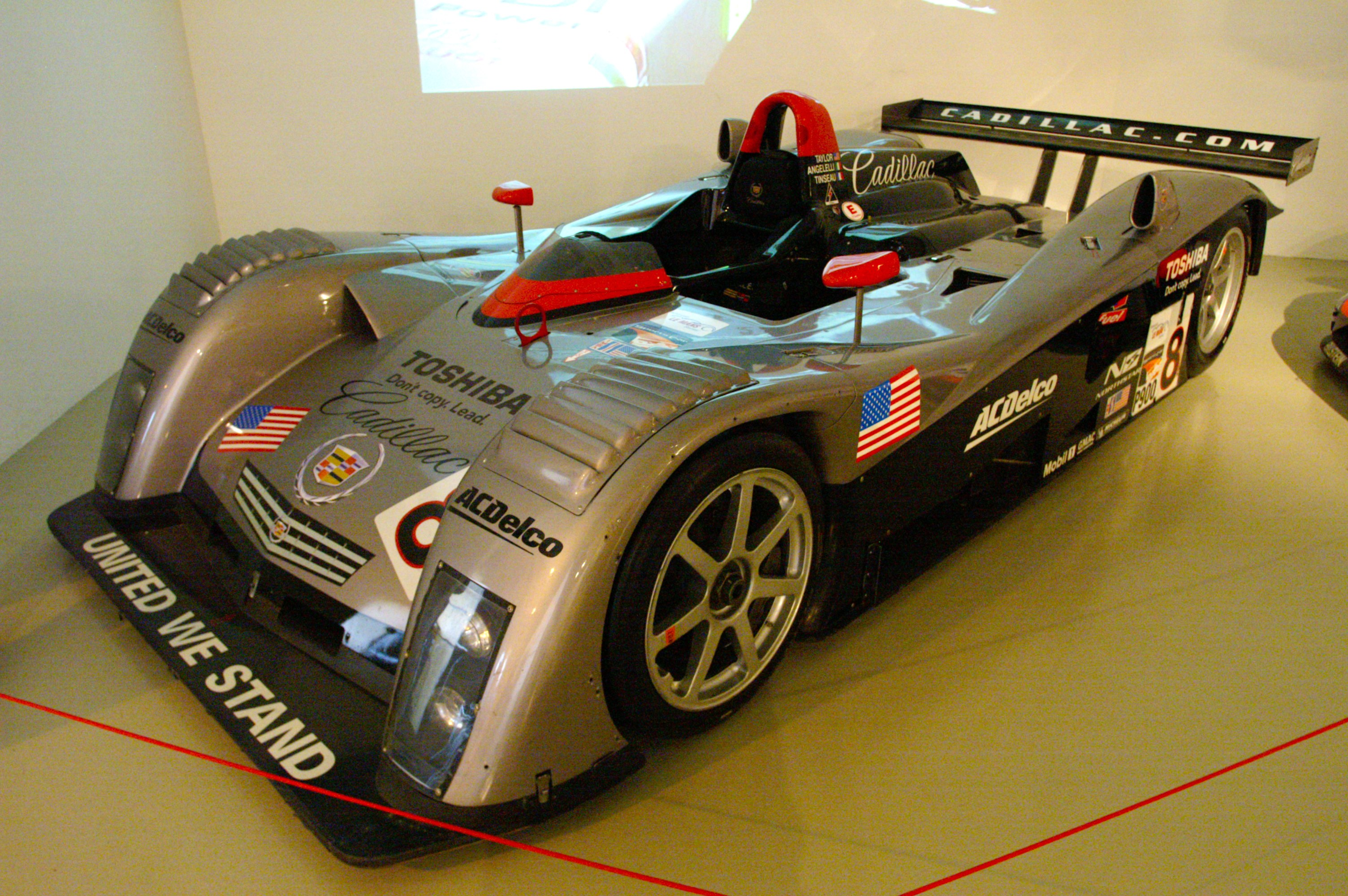 Le Musee des 24 Heure, 19th Place Le Mans 2002